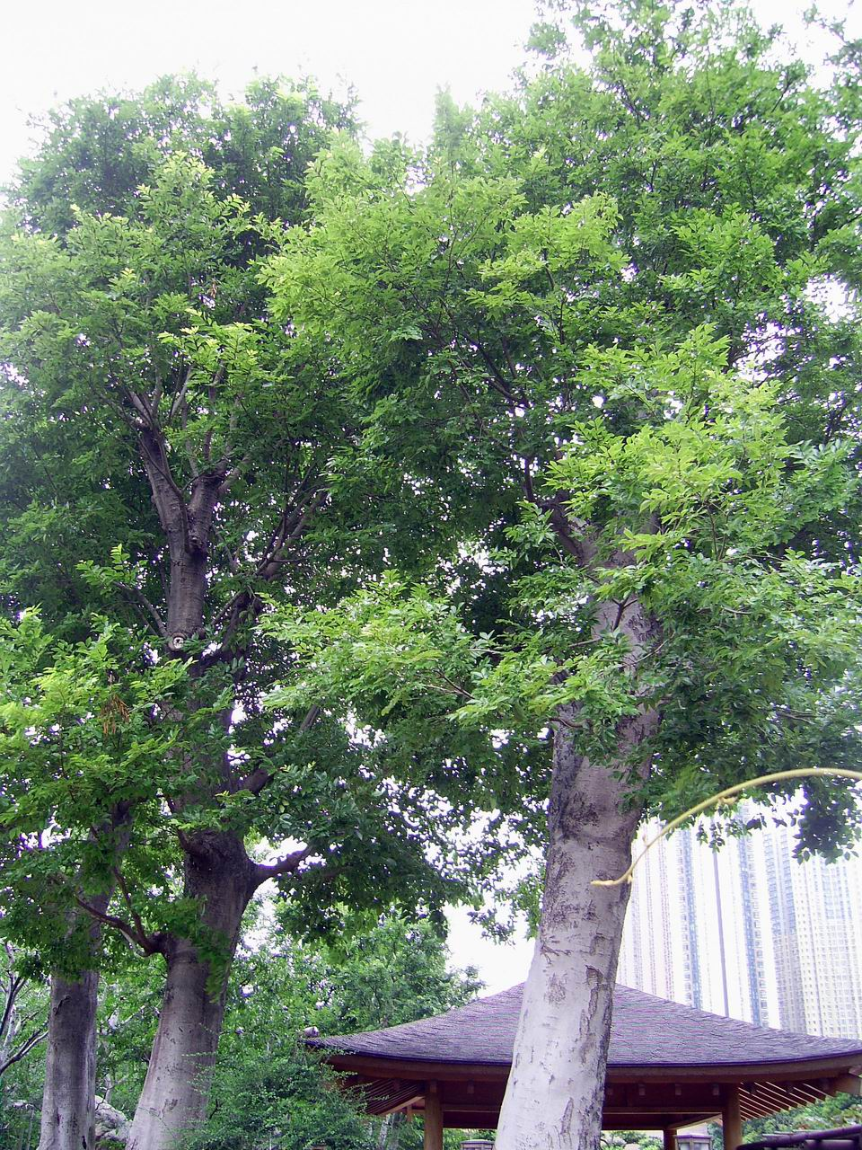 南蓮園池內的三株朴樹